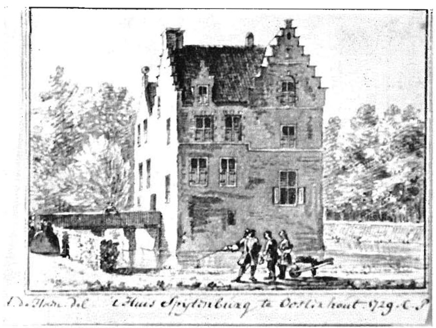 Slotje Spijtenburg in 1729, gezien vanuit het noorden